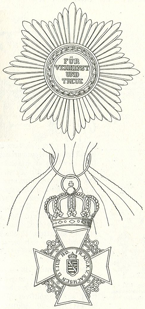 Orde van Verdienste Saksen